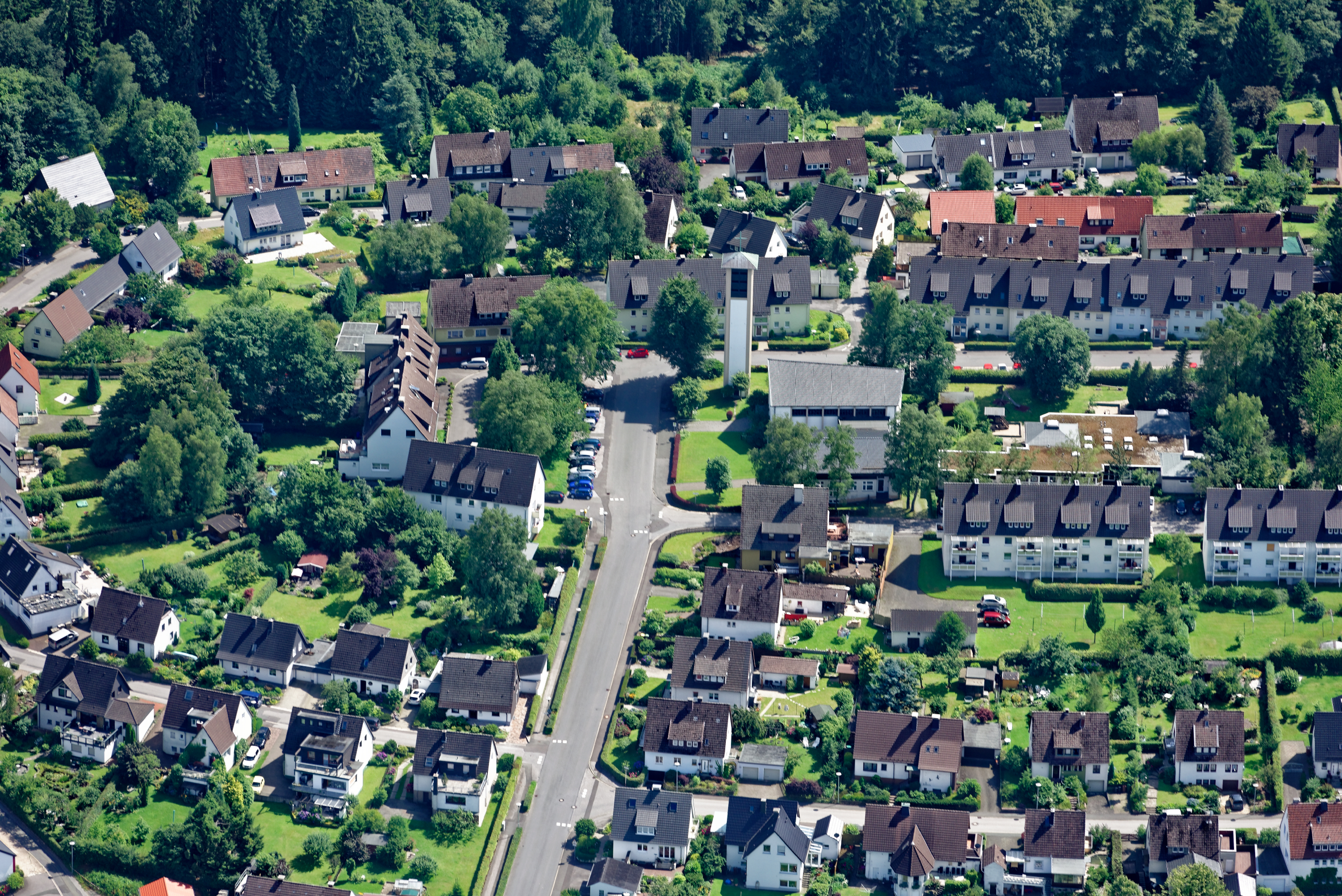 Luftaufnahme: Lüdenscheider Ortsteil Bierbaum mit Apostelkirche.